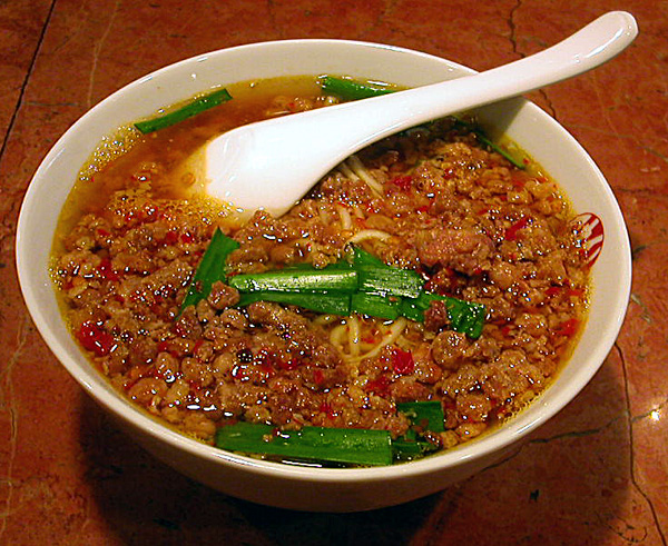 Unknown language: *撮影者：小太刀 味仙の台湾ラーメン 麺の上に見えるのは挽肉、唐辛子、ニラです。